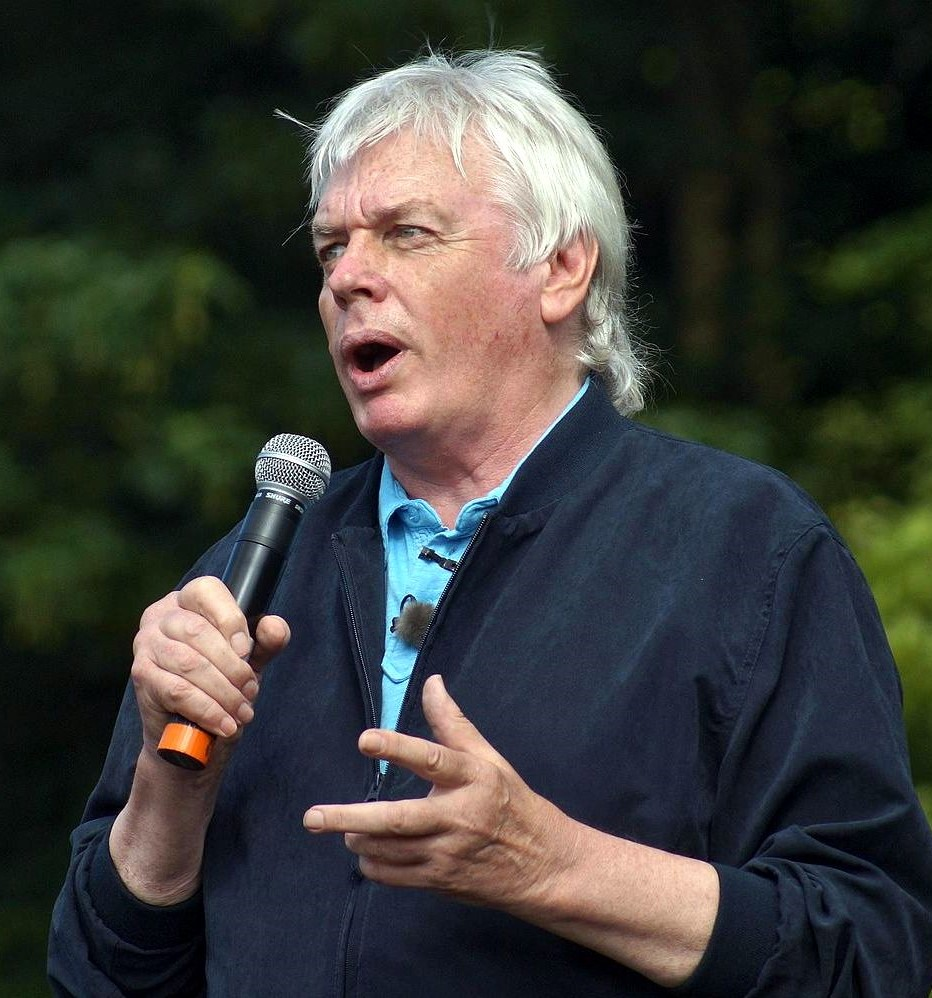 David Icke